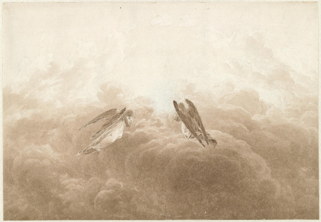 Engel in Anbetung, um 1826, Sepia, 26 x 18 cm